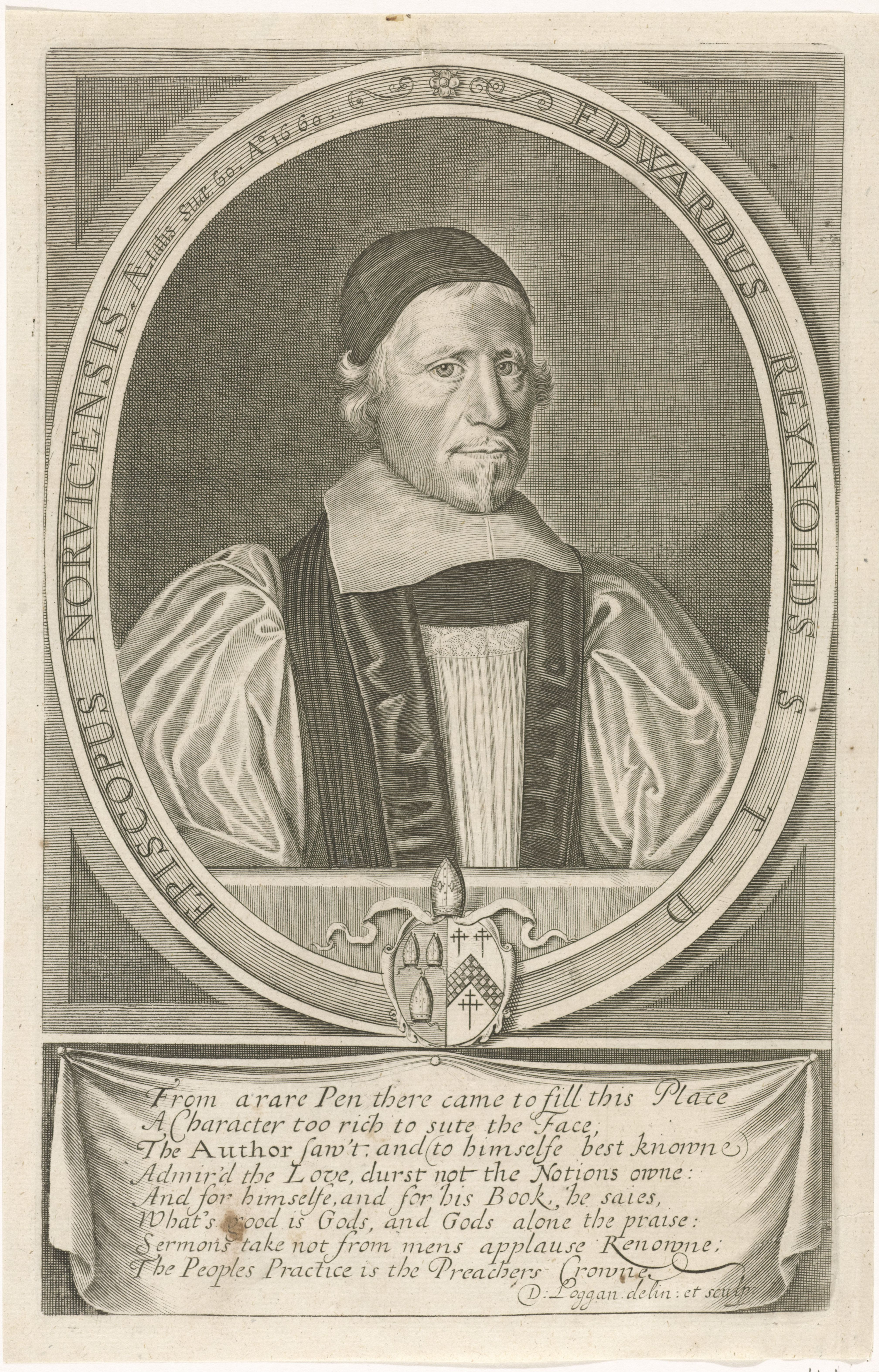 IdentificatieTitel(s): Portret van Edward ReynoldsObjecttype: prent Objectnummer: RP-P-1910-414Catalogusreferentie: Hollstein Dutch 55Opschriften / Merken: verzamelaarsmerk, verso, gestempeld: Lugt 2228Omschrijving: Portret van Edward Reynolds, bisschop te Norwich, Engeland.VervaardigingVervaardiger: prentmaker: David Loggan (vermeld op object)naar eigen ontwerp van: David Loggan (vermeld op object)schrijver: anoniemDatering: 1643 - 1692Fysieke kenmerken: gravureMateriaal: papier Techniek: graveren (drukprocedé)Afmetingen: plaatrand: h 242 mm × b 151 mmOnderwerpWie: Edward ReynoldsVerwerving en rechtenVerwerving: aankoop 1905Copyright: Publiek domein